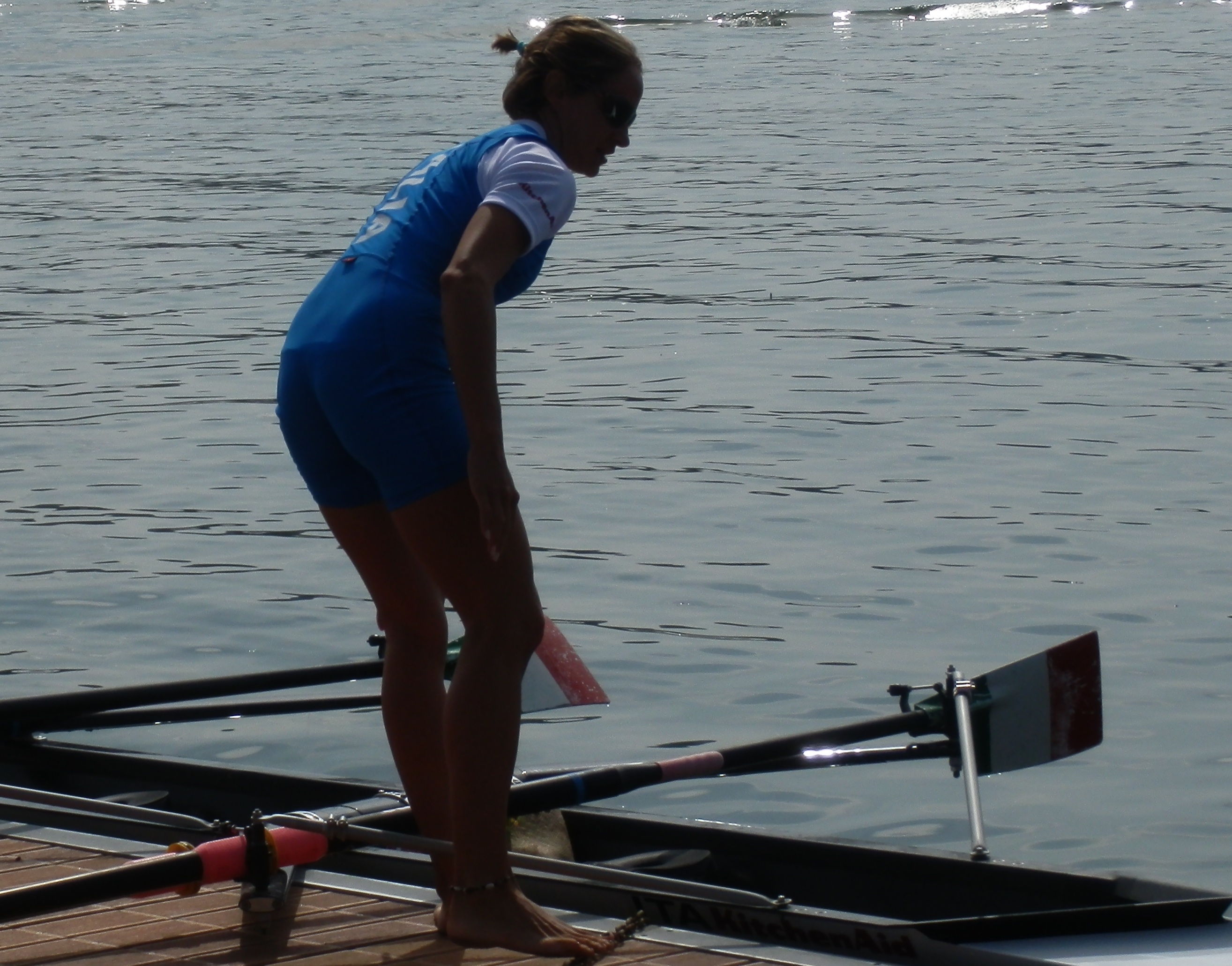 Elisabetta Sancassani mentre sale sulla barca dopo la premiazione con la medaglia d'oro agli Europei 2012 vinti in coppia con Laura Milani